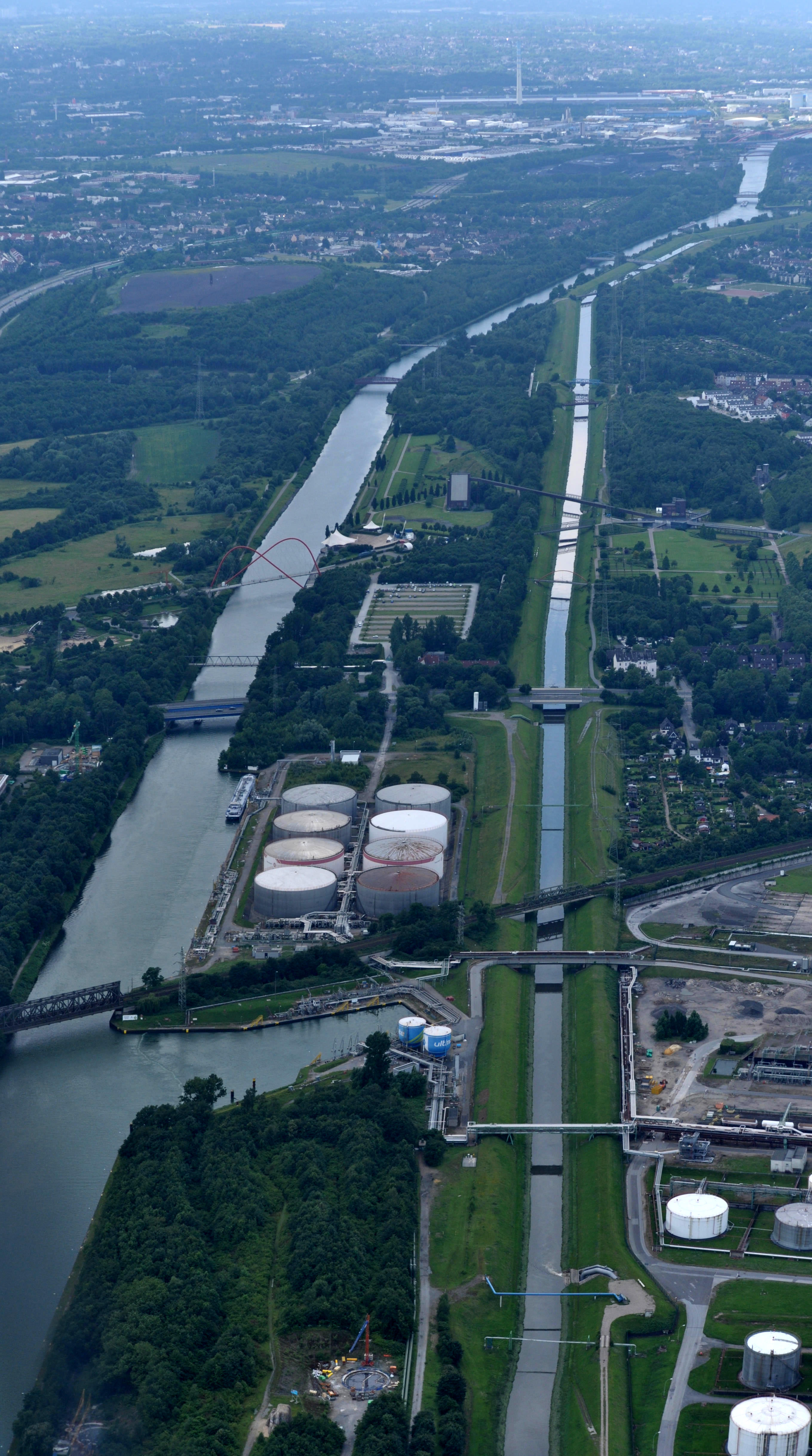 Rhein-Herne-Kanal und Emscher bei Gelsenkirchen; Aufnahme von Ost; Luftbild aus ca. 600m Höhe über Grund